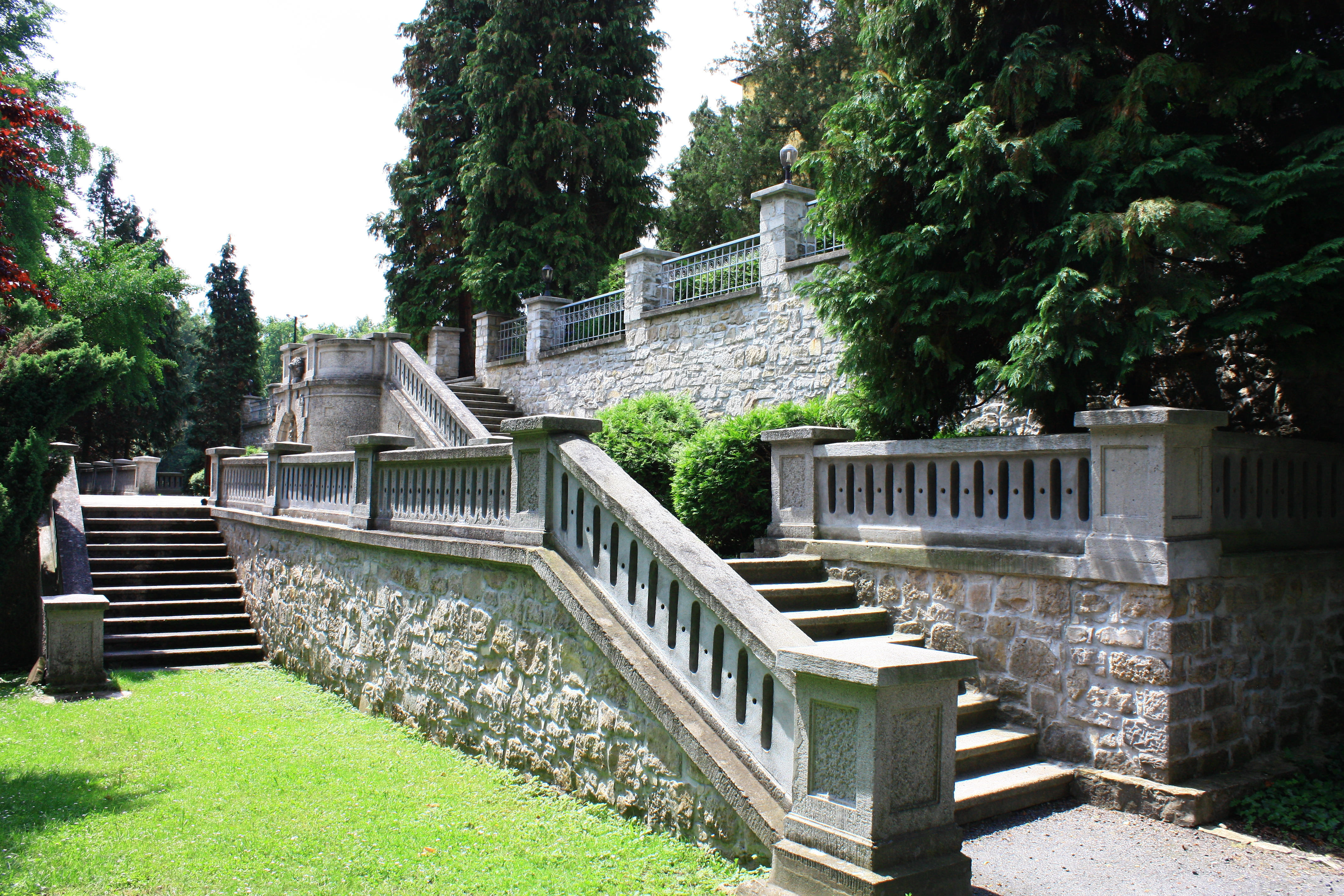 Rogów Opolski, most